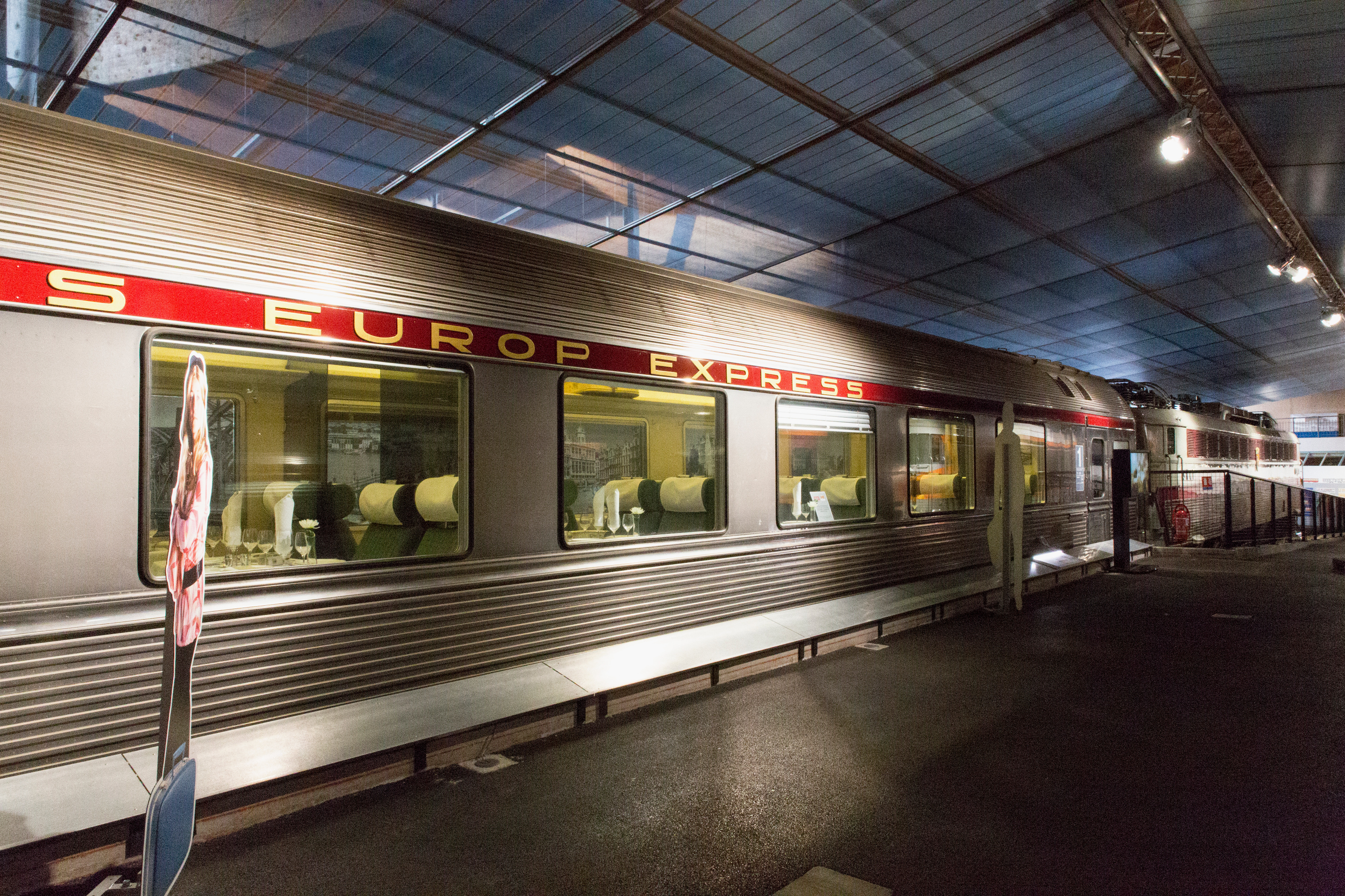 Voiture TEE A8tuj Mistral 1969 à la Cité du train.